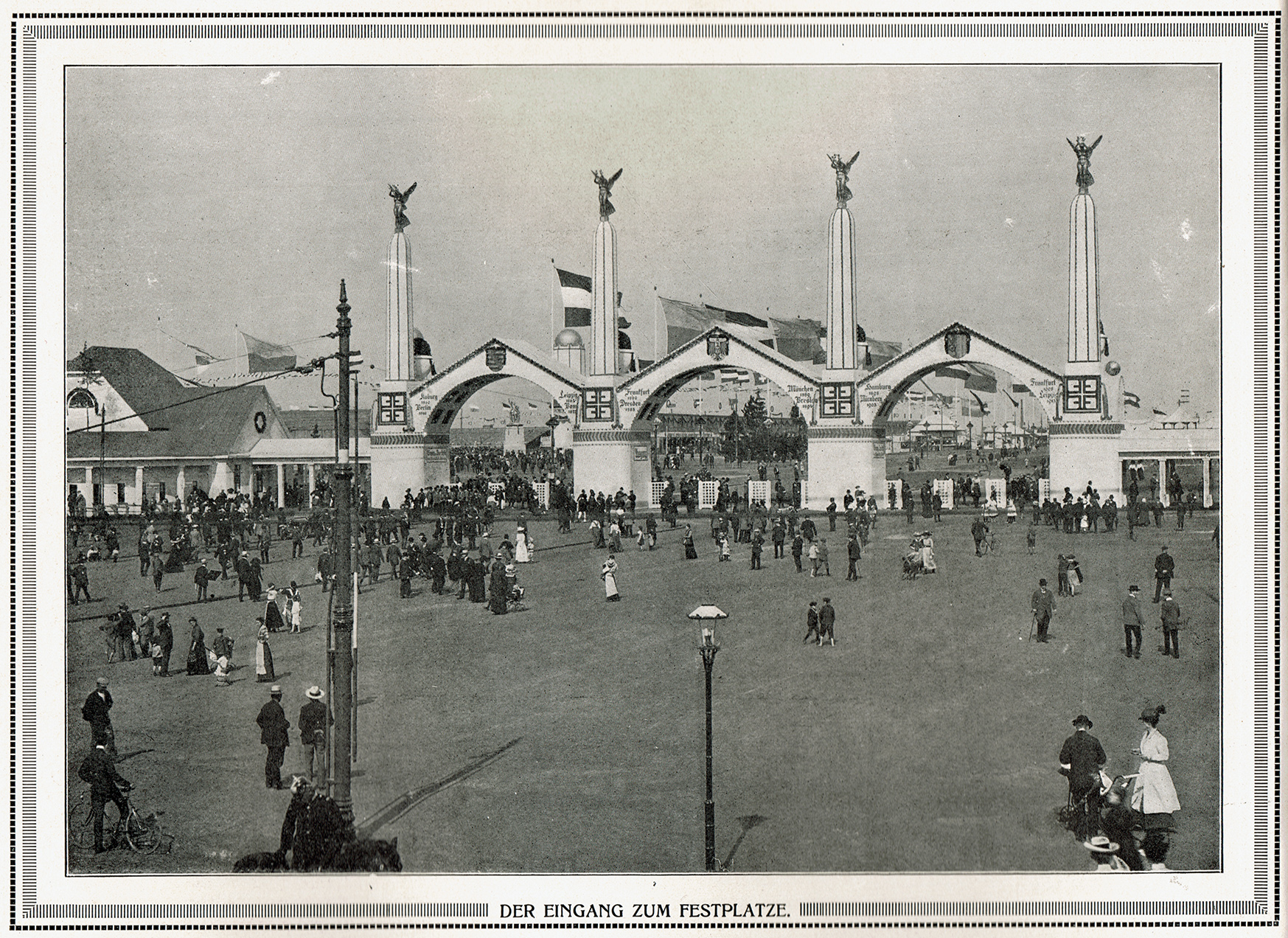 Deutsches Turnfest 1913 in Leipzig, der Eingang zum Festplatz